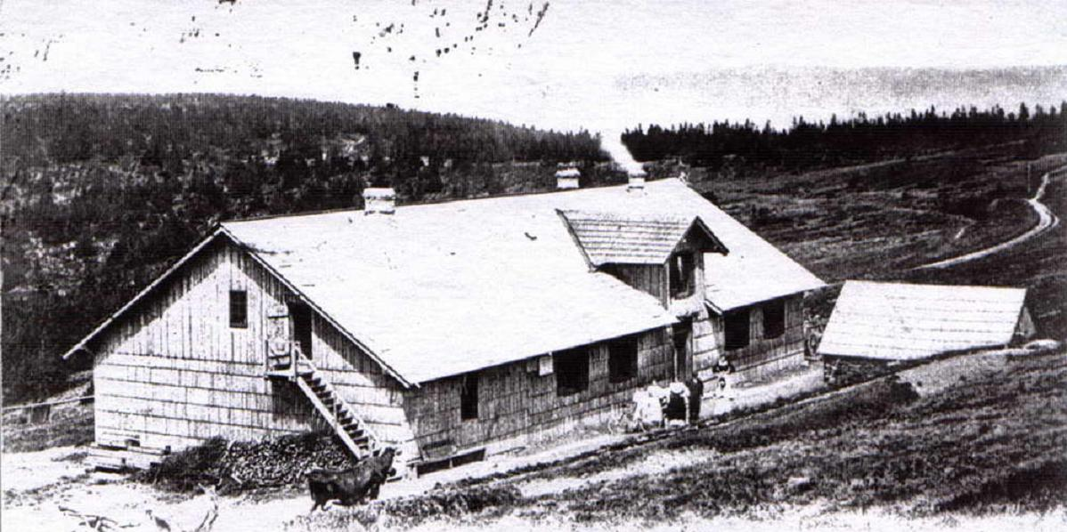 Historyczne zdjęcie (schronisko Švýcárna)